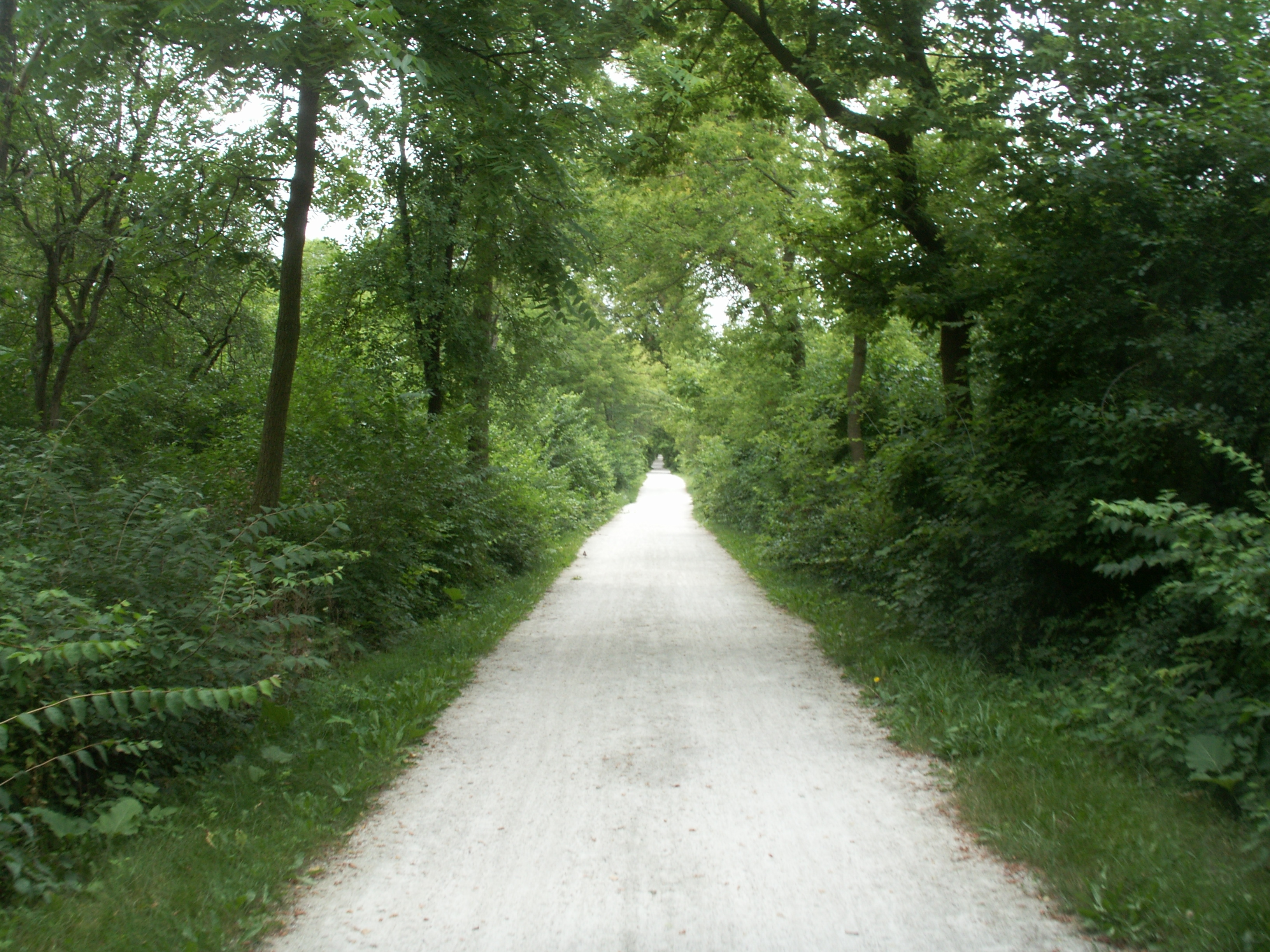 Illinois Prairie Path